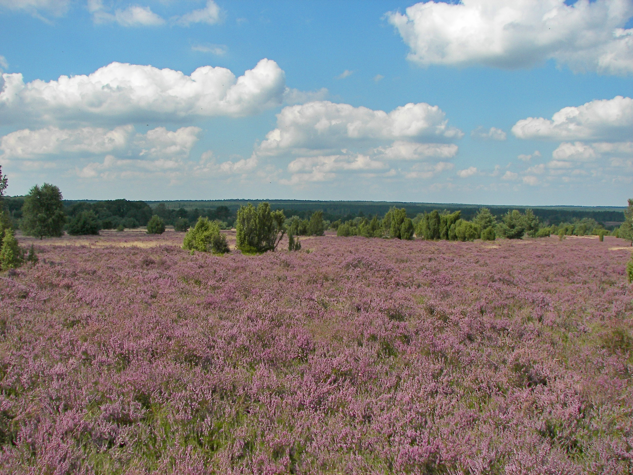 Heide bei Wilsede ("Pastor-Bode-Weg")